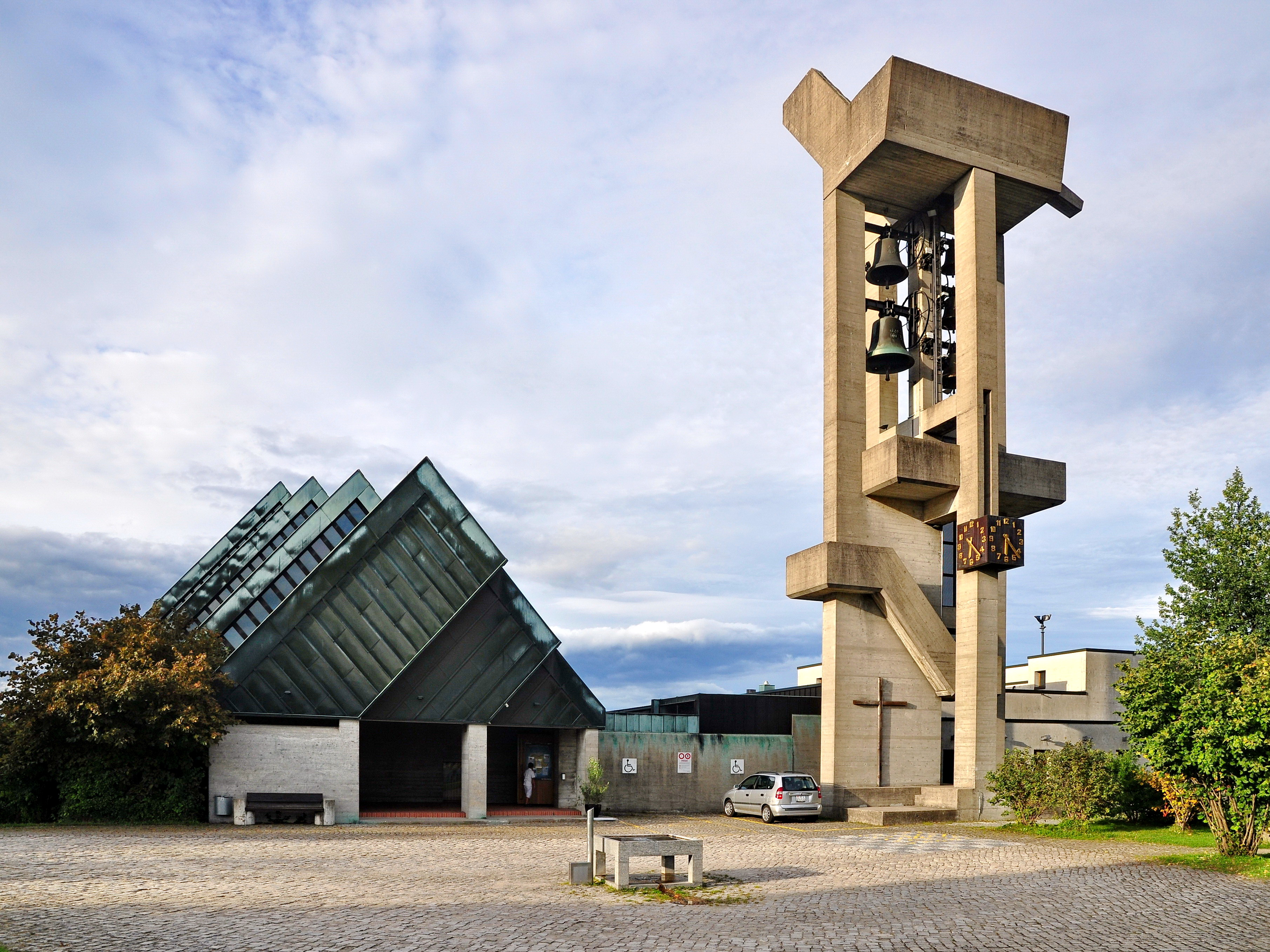 Reformierte Kirche, Rebbuckstrasse in Effretikon (Switzerland)